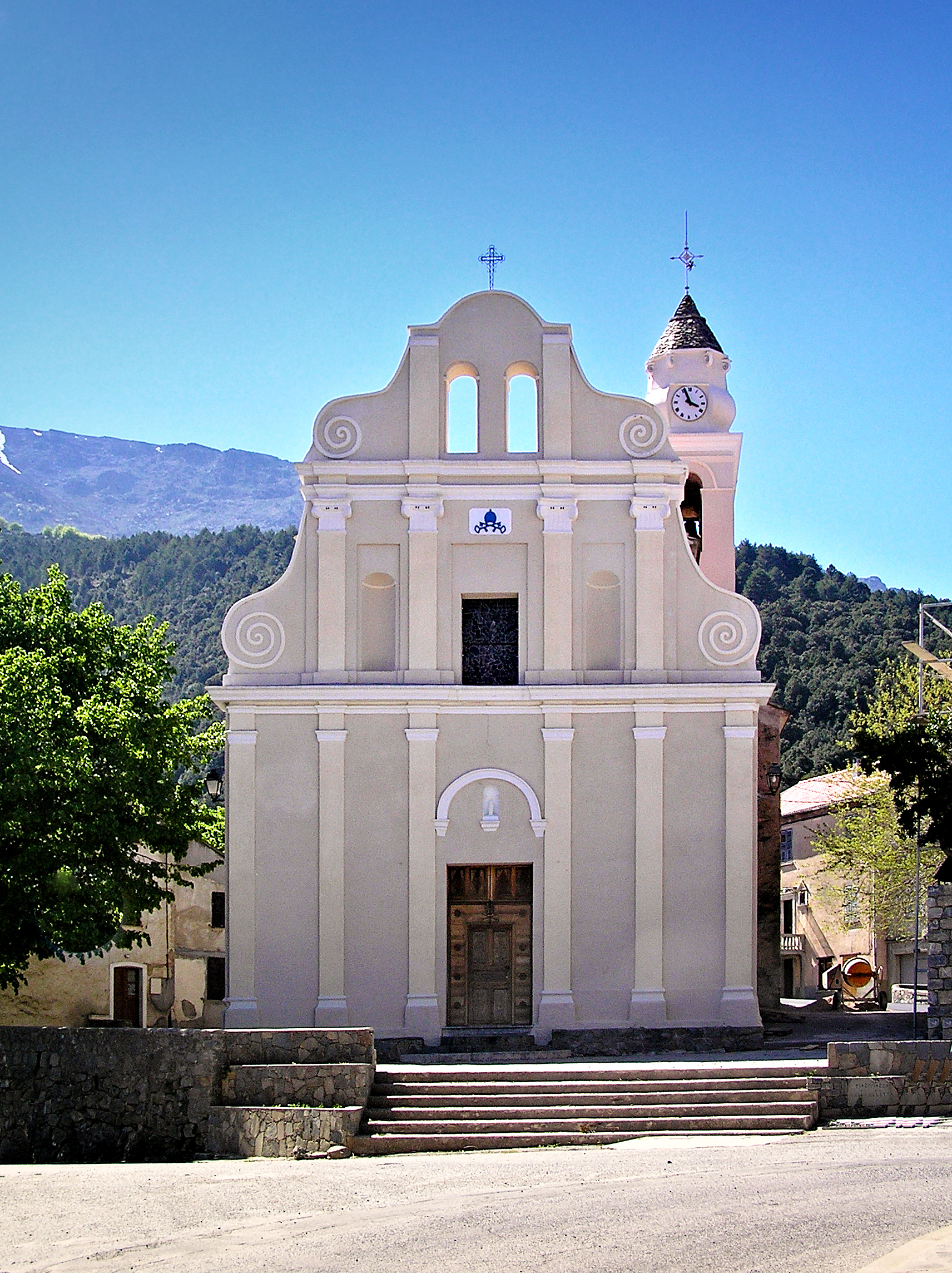 Santo-Pietro-di-Venaco (Corsica) - Église Saint-Pierre